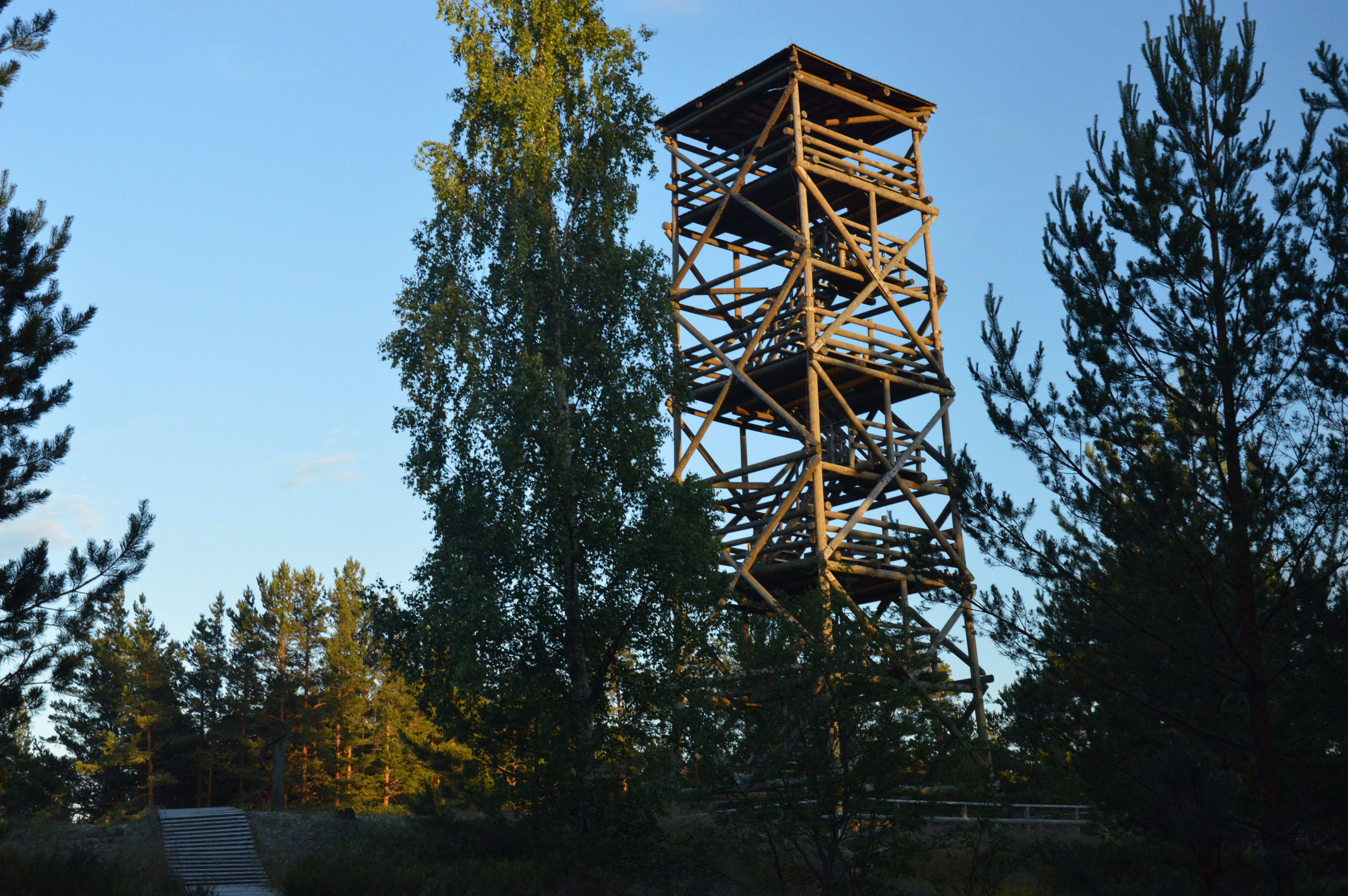 Rannametsa vaatetorn